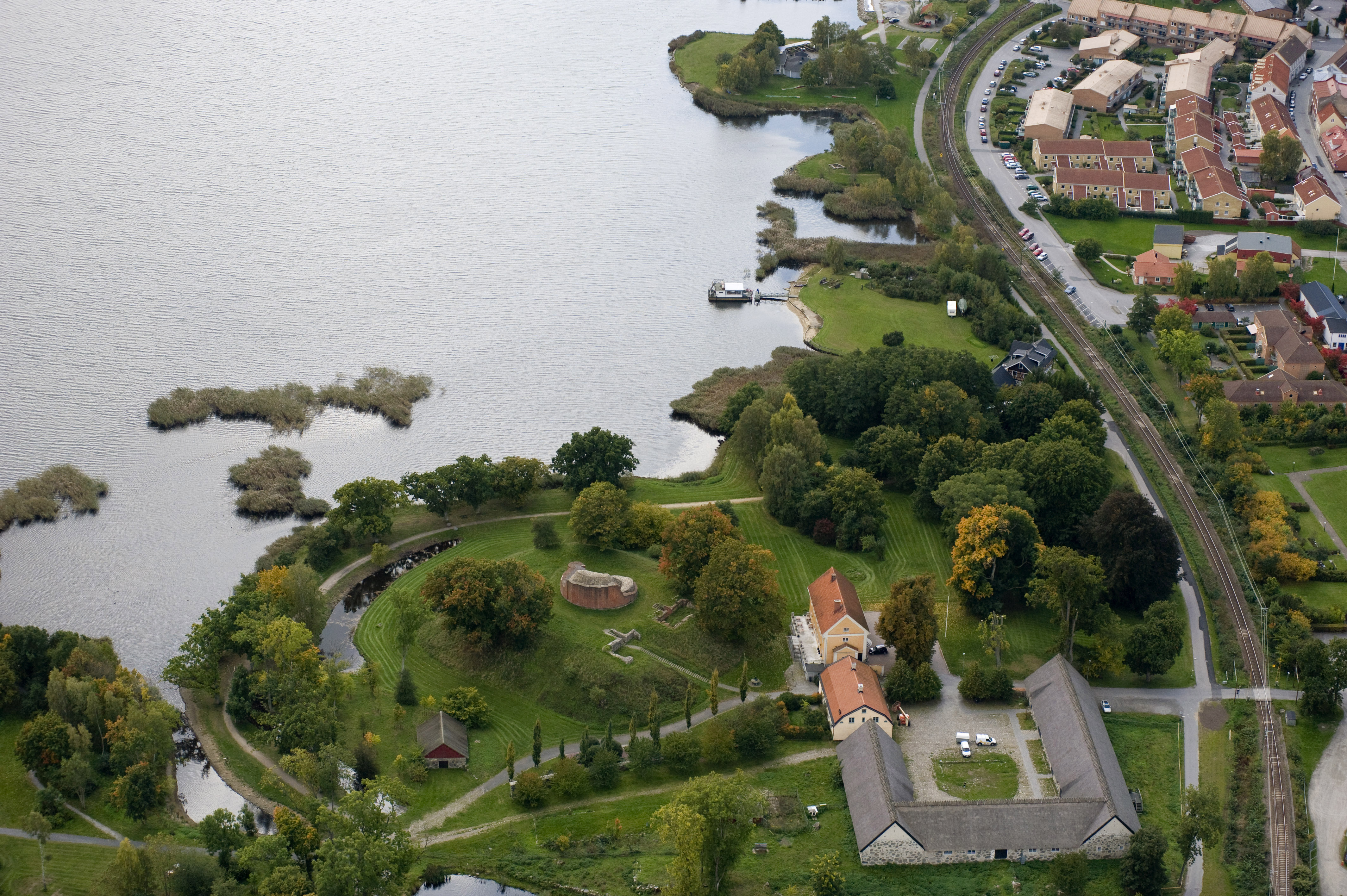 Sölvesborgs slott från luften